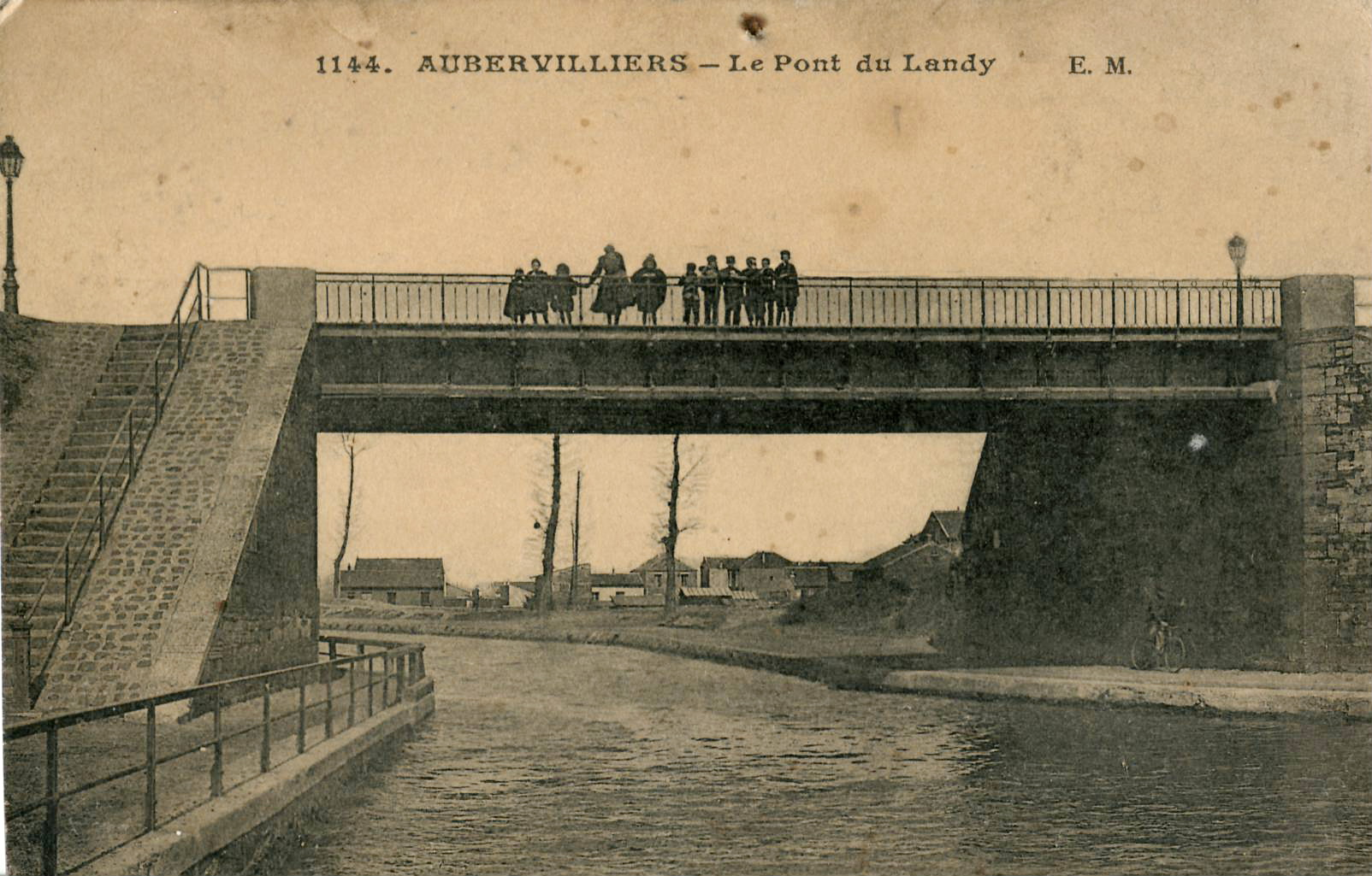 Carte postale ancienne éditée par EM 1144 :AUBERVILLIERS - Le Pont du Landy